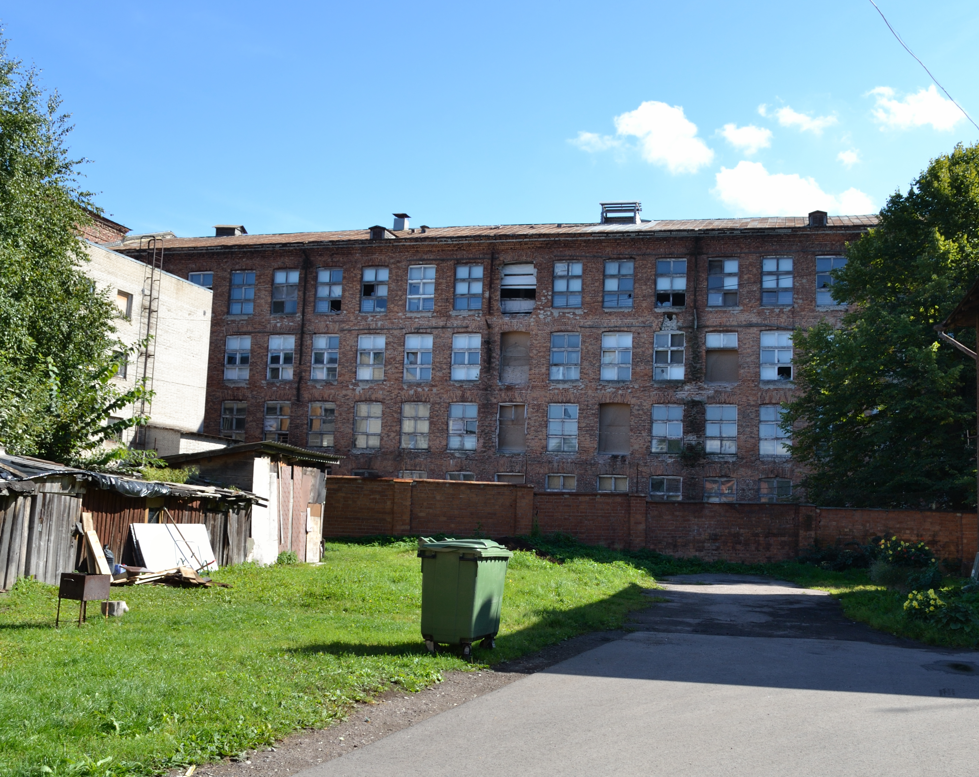 Tallinn, Balti Puuvillavabriku tootmishoone peakorpus, 1900-1909